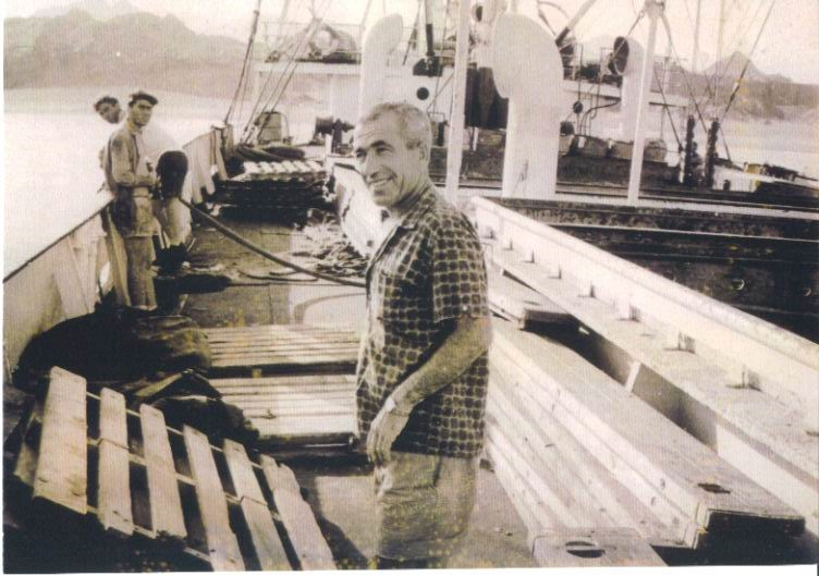 אל"מ אברהם בוצר קיבל את הפיקוד על זירת ים סוף מפקח על הכנת האניה 'עמליה' בנמל אילת, יוני 1967.